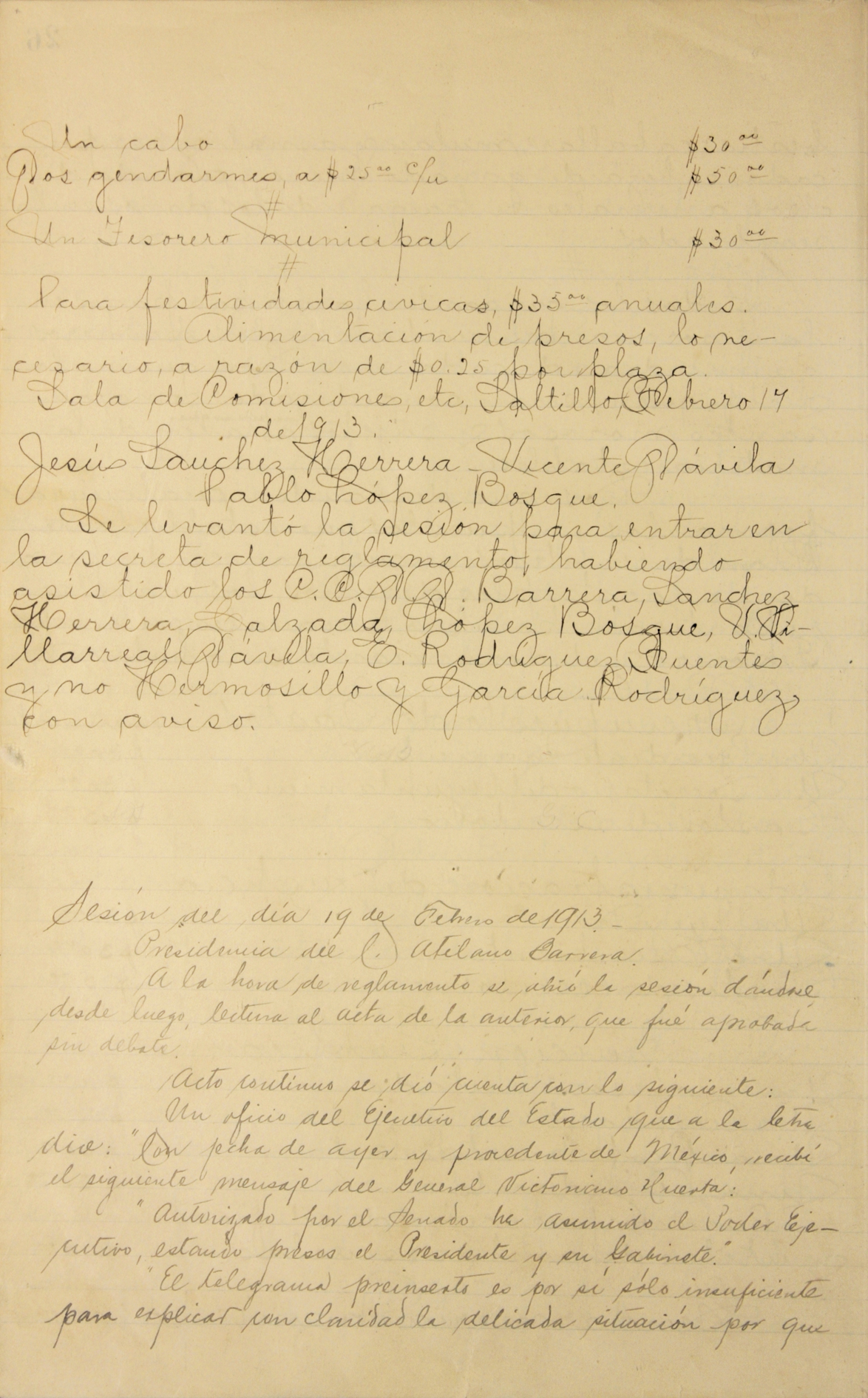 Transcripción del oficio que Victoriano Huerta [1850-1916] envió desde México en el manifiesta que autorizado por el Senado asumió el Poder Ejecutivo como Primer Magistrado de la Nación